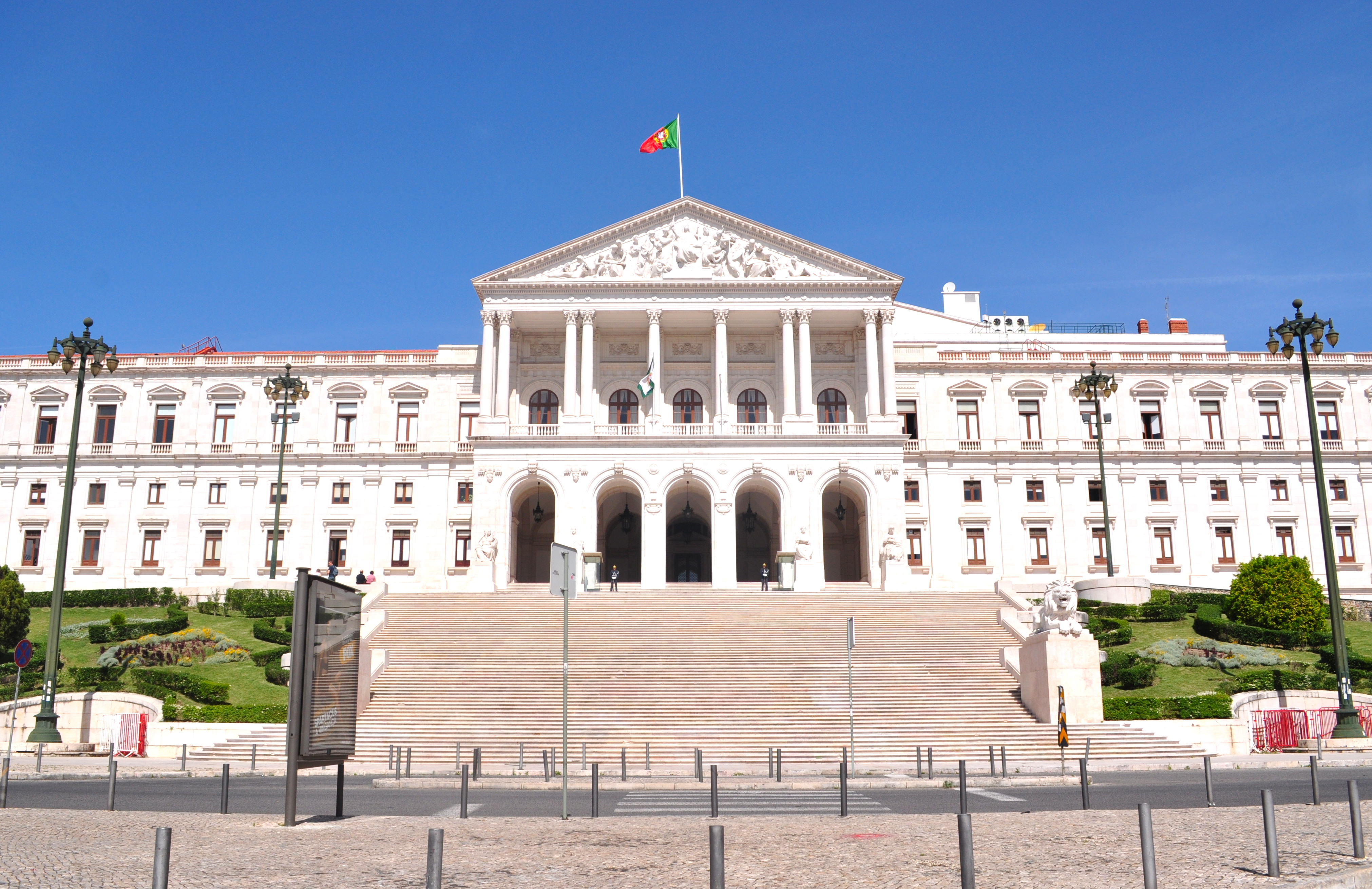 Escadarias de São Bento